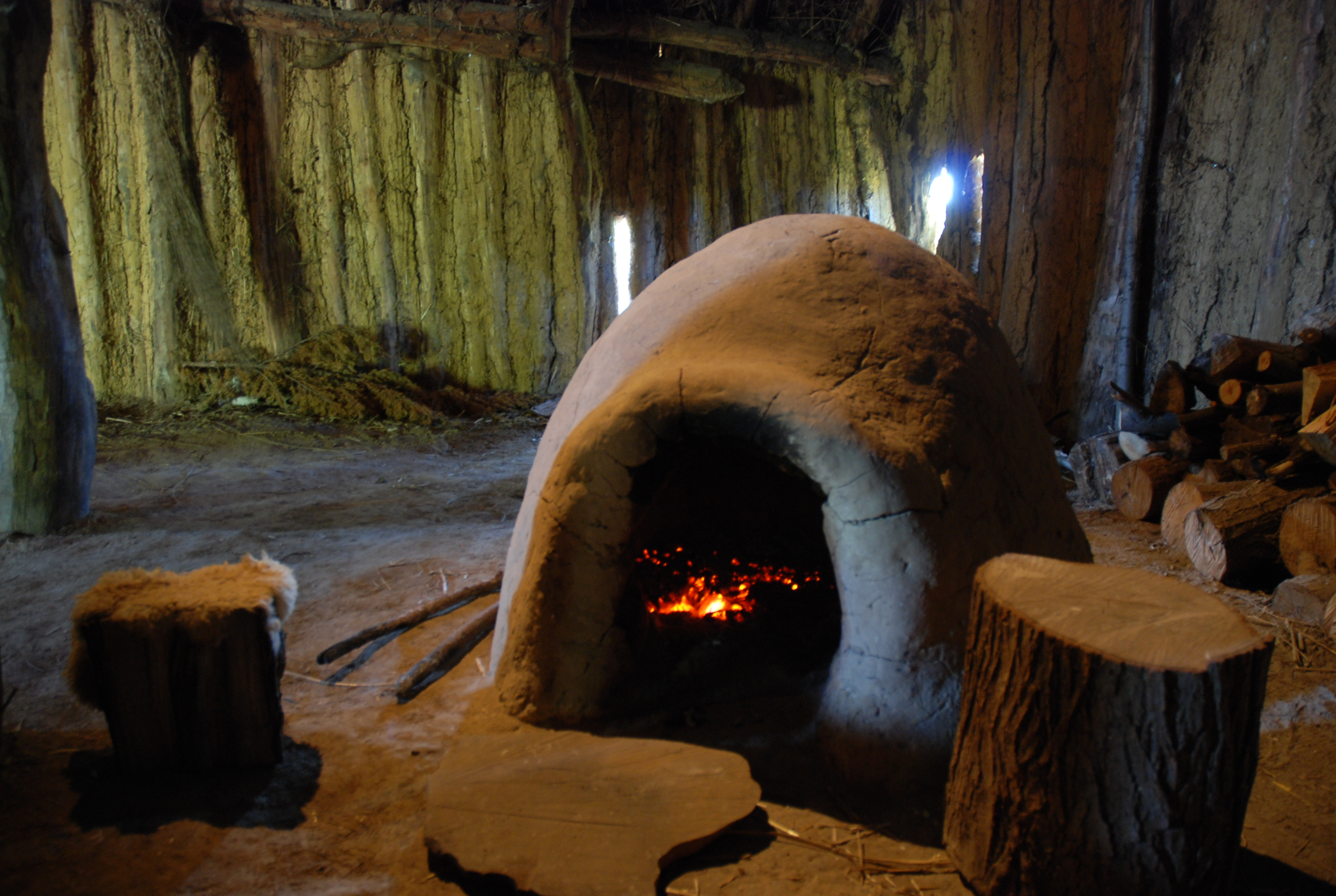 Reconstructie van een oven in de gereconstrueerde woning uit neolithicum in het park Samara vlak bij Amiens, Frankrijk